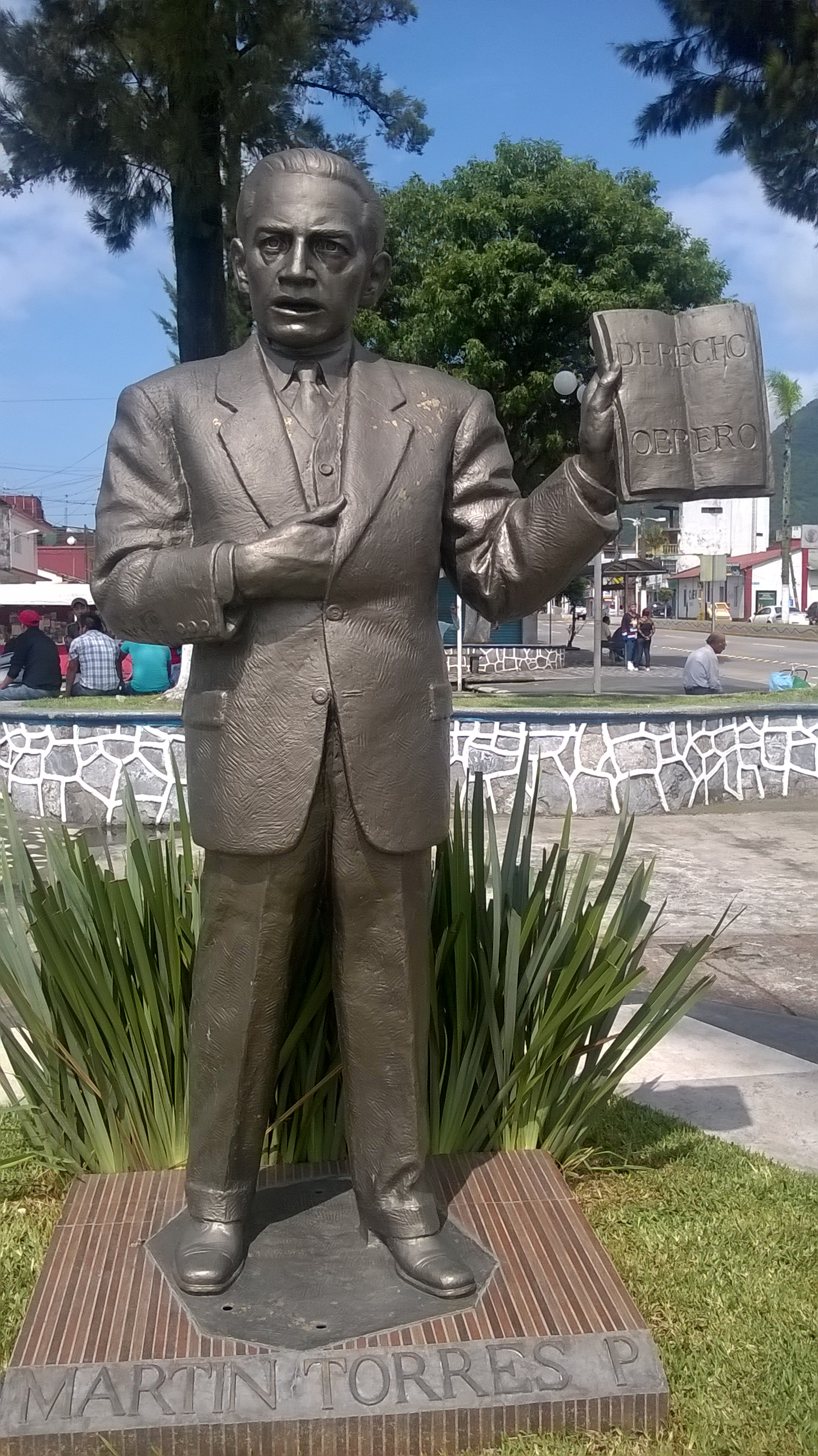 Martín Torres Padilla